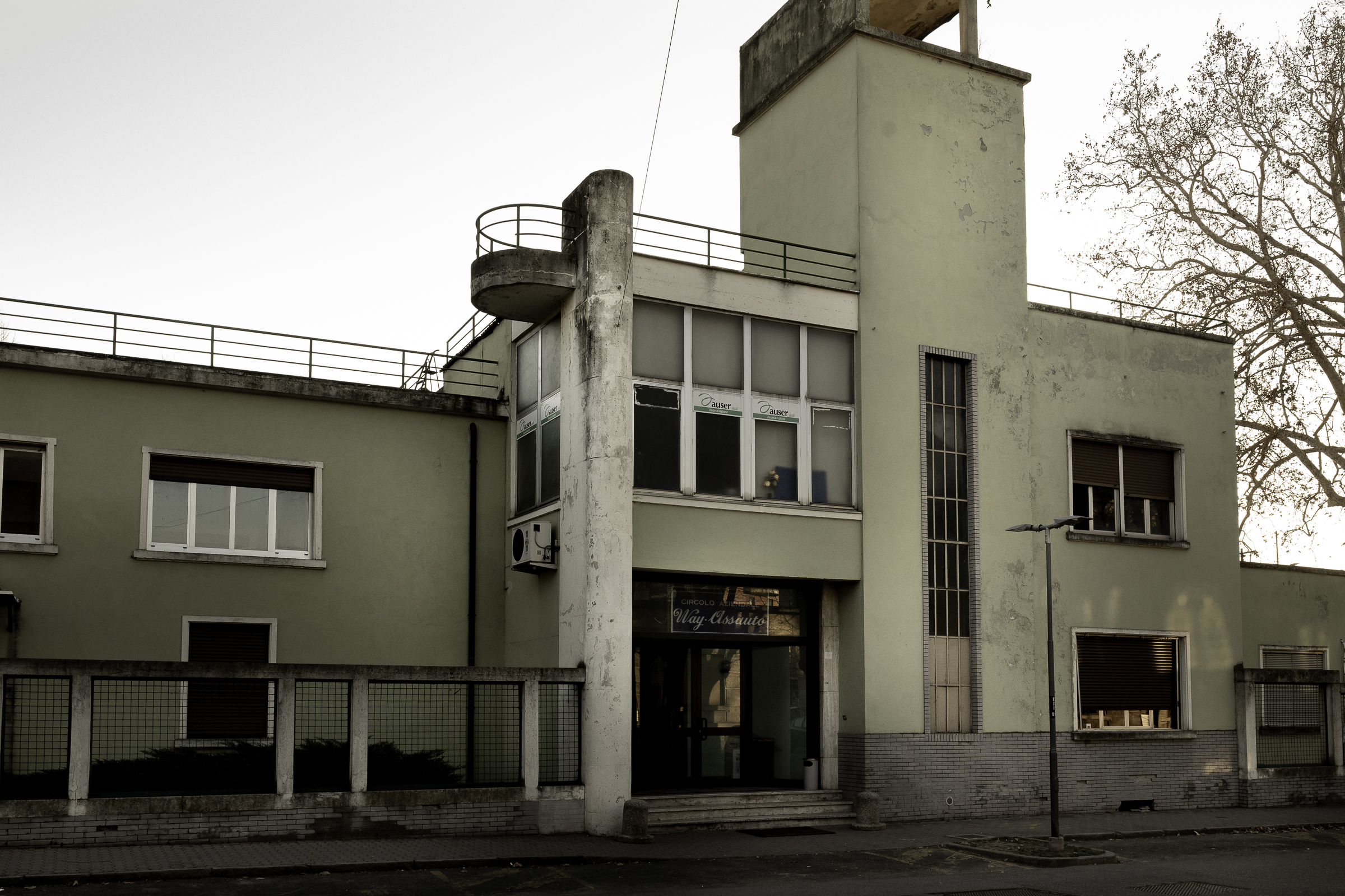 Il circolo è ancora oggi un luogo di ritrovo e di riferimento per molti